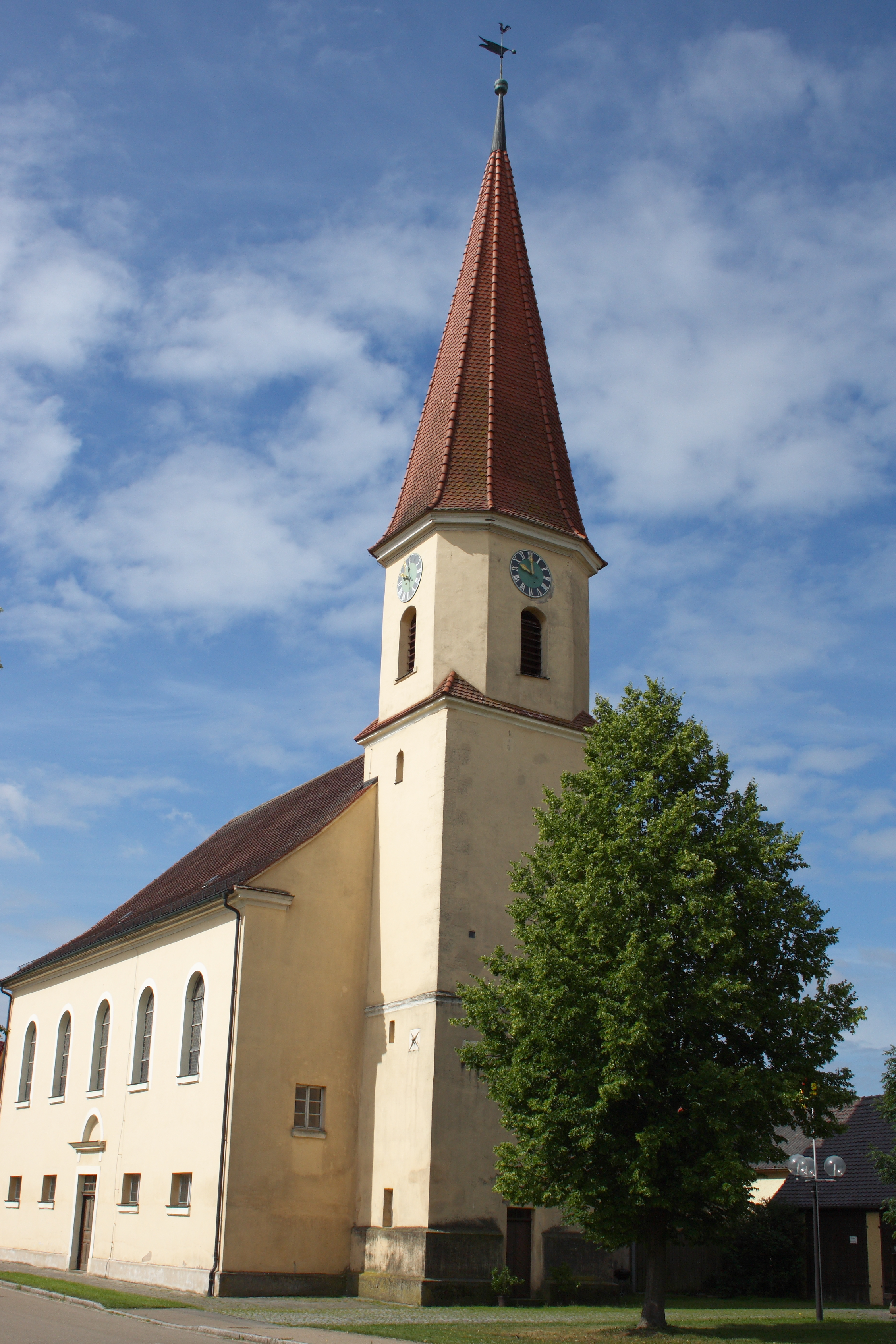 Evangelische Pfarrkirche, ehemals St. Anna, in Obermögersheim, einem Stadtteil von Wassertrüdingen im Landkreis Ansbach (Bayern), mit mittelalterlichem Turm, Saalbau von 1821